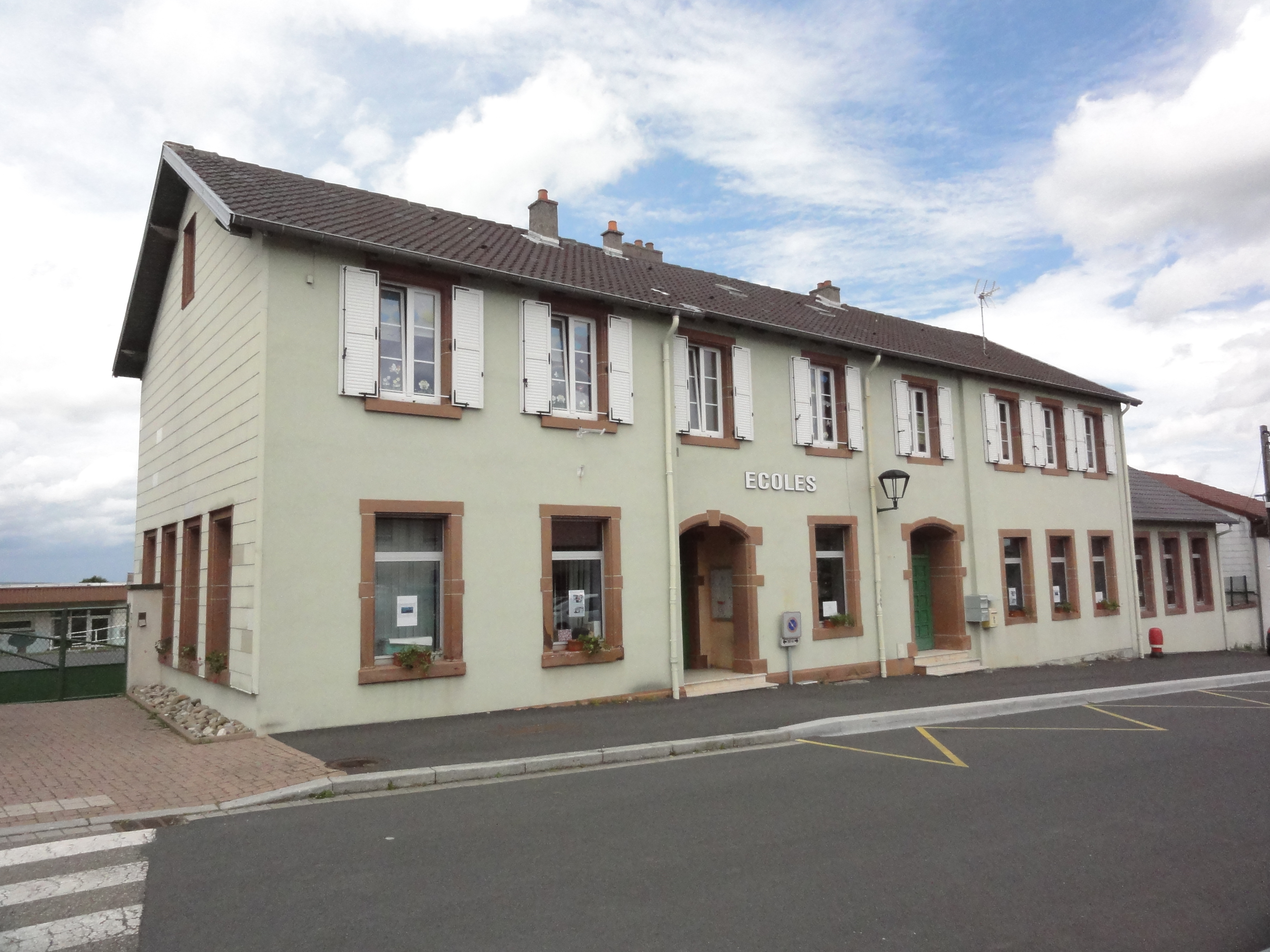 Brouderdorff (Moselle) école